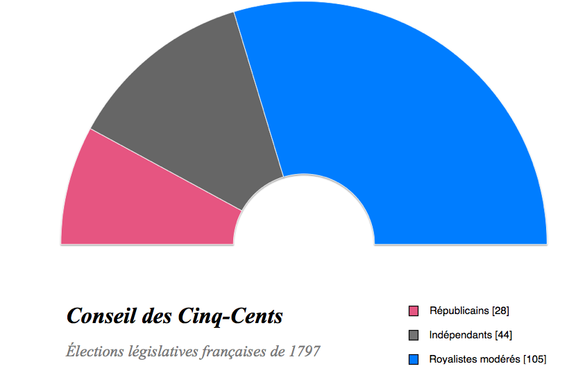 Composition du Conseil des Cinq-Cents suite aux élections législatives de 1797.